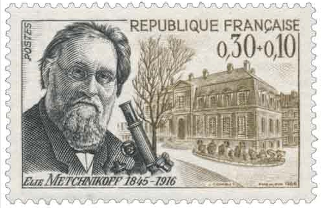 Timbre commémoratif de la République Française